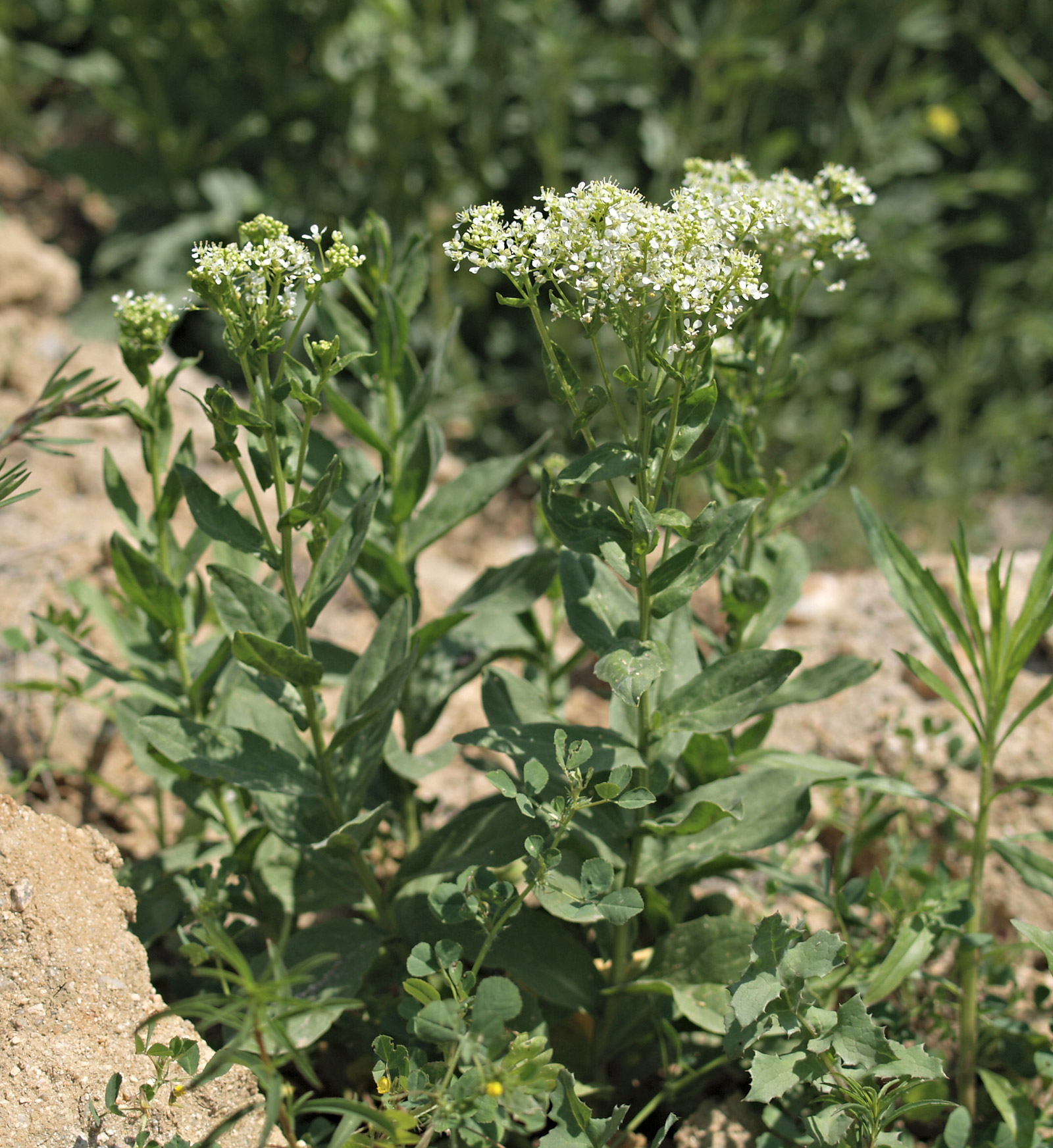 Cardaria draba. Barrio de Peñagrande, Madrid.